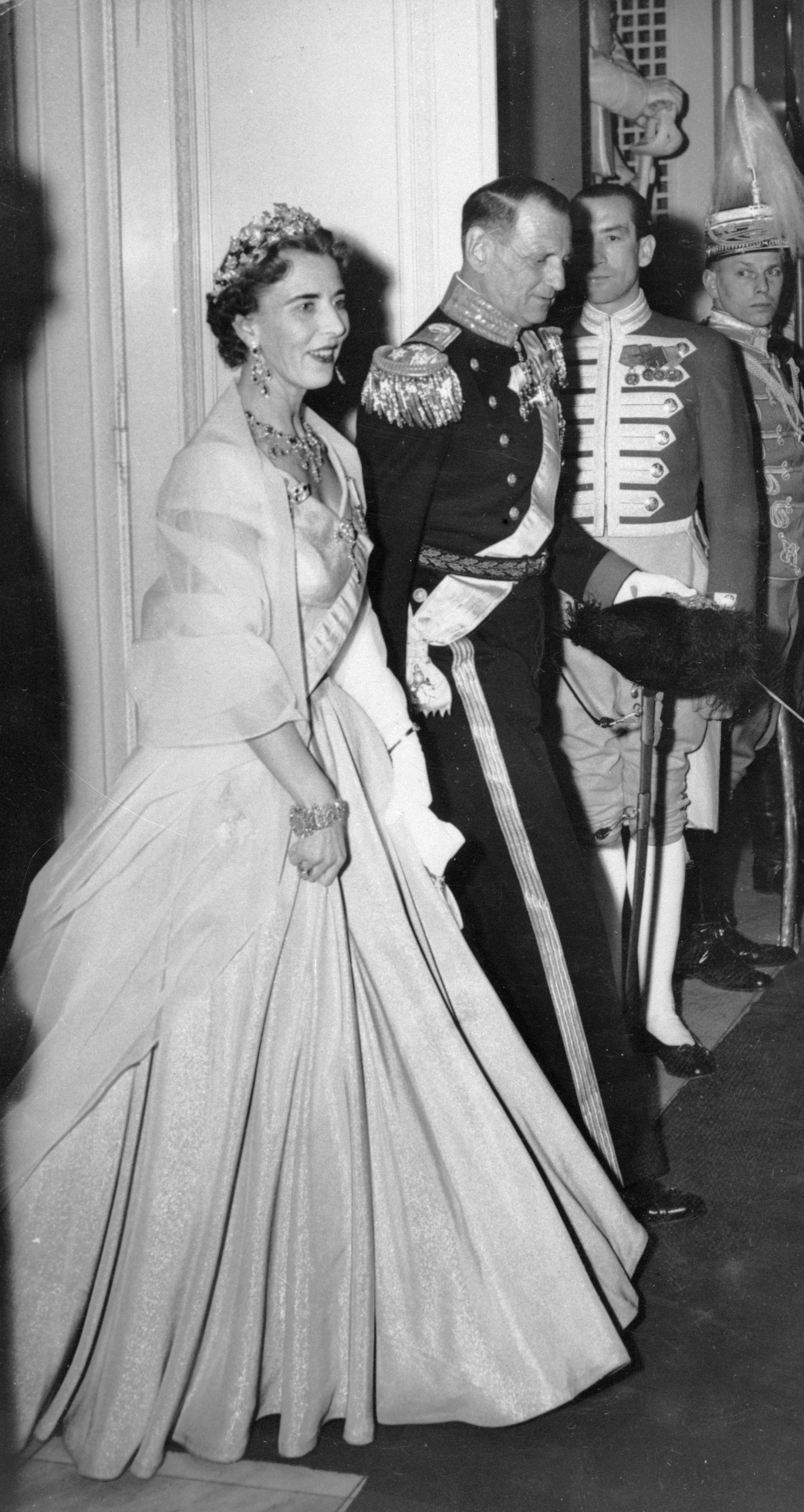 Collectie / Archief : Fotocollectie Van de Poll Reportage / Serie : 55e verjaardag van koning Frederik IX Beschrijving : Koning Frederik IX en koningin Ingrid in gala-kleding met op de achtergrond lakeien Datum : 11 maart 1954 Locatie : Denemarken, Kopenhagen Trefwoorden : feestkleding, koningen, koninginnen, lakeien, paleizen, uniformen, verjaardagen Persoonsnaam : Frederik IX (koning Denemarken), Ingrid (koningin Denemarken) Fotograaf : Poll, Willem van de, [onbekend] Auteursrechthebbende : Nationaal Archief Materiaalsoort : Negatief (zwart/wit) Nummer archiefinventaris : bekijk toegang 2.24.14.02 Bestanddeelnummer : 252-9270